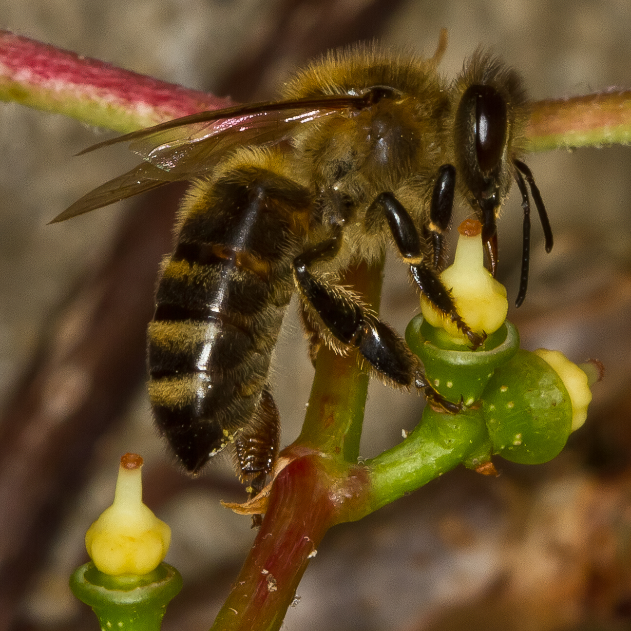 Sachsen, Garten: Westliche Honigbiene in der Dreispitzigen Jungfernrebe